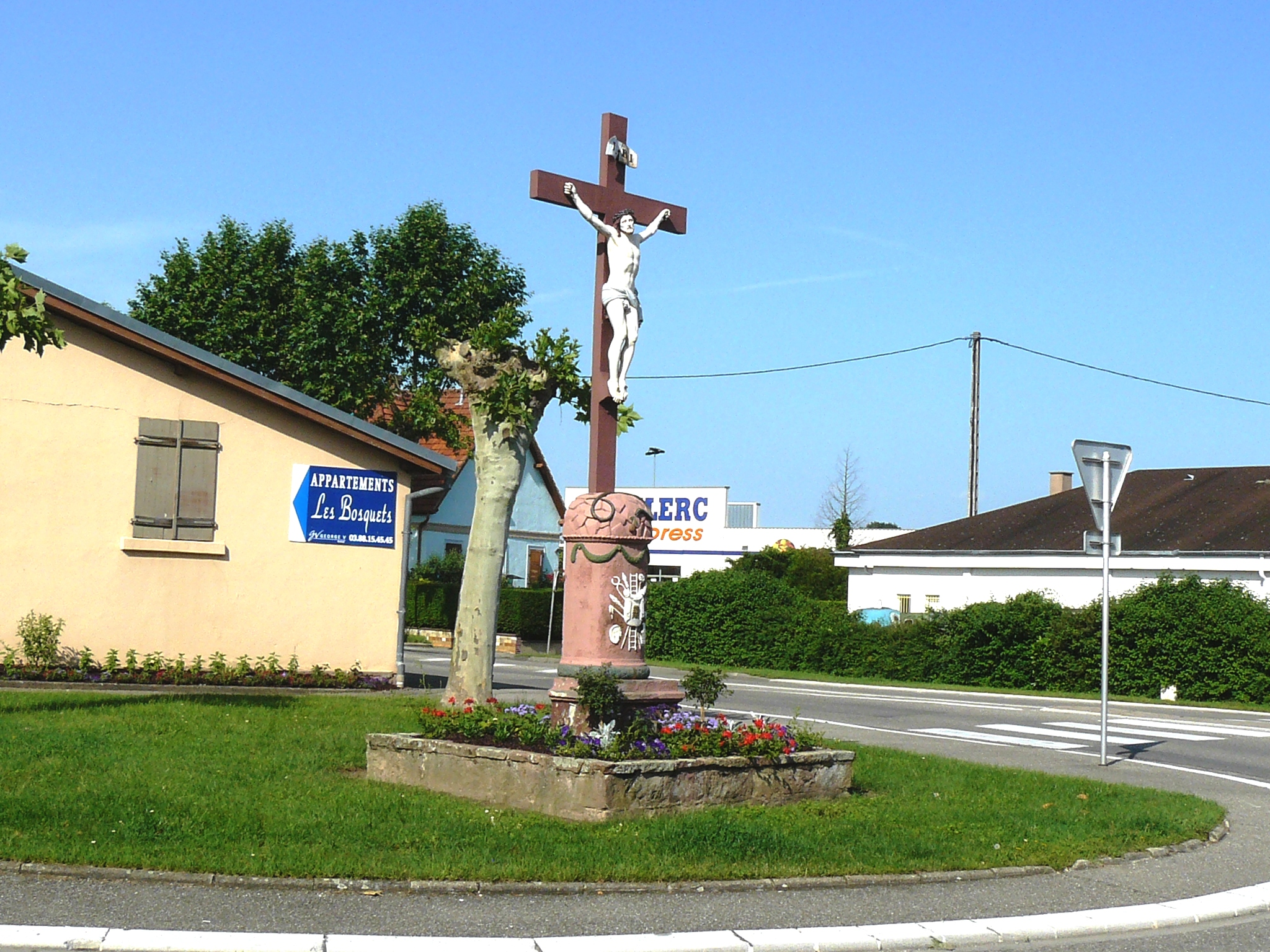 Calvaire